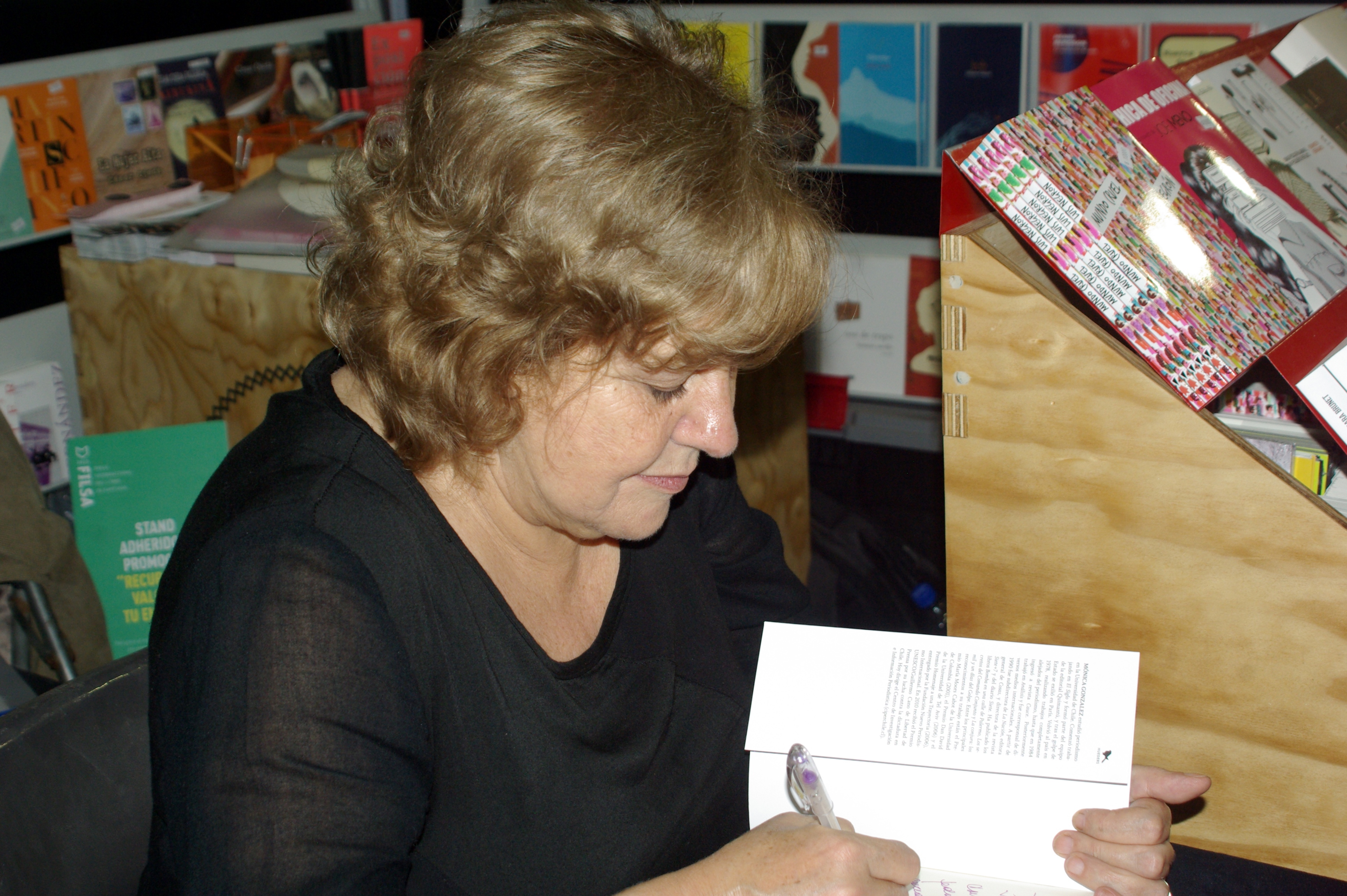 La periodista chilena Mónica González en la Feria Internacional del Libro de Santiago 2015